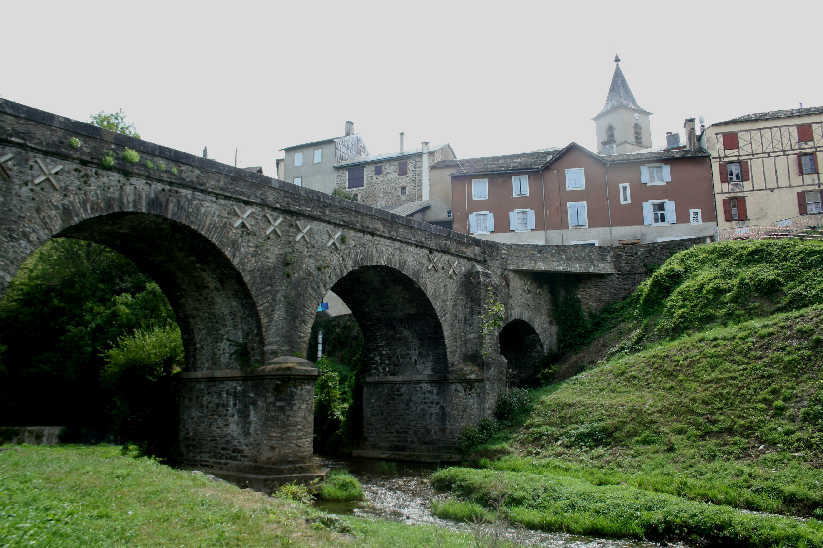 Lacaze (Tarn) - pont sur le Gijou.